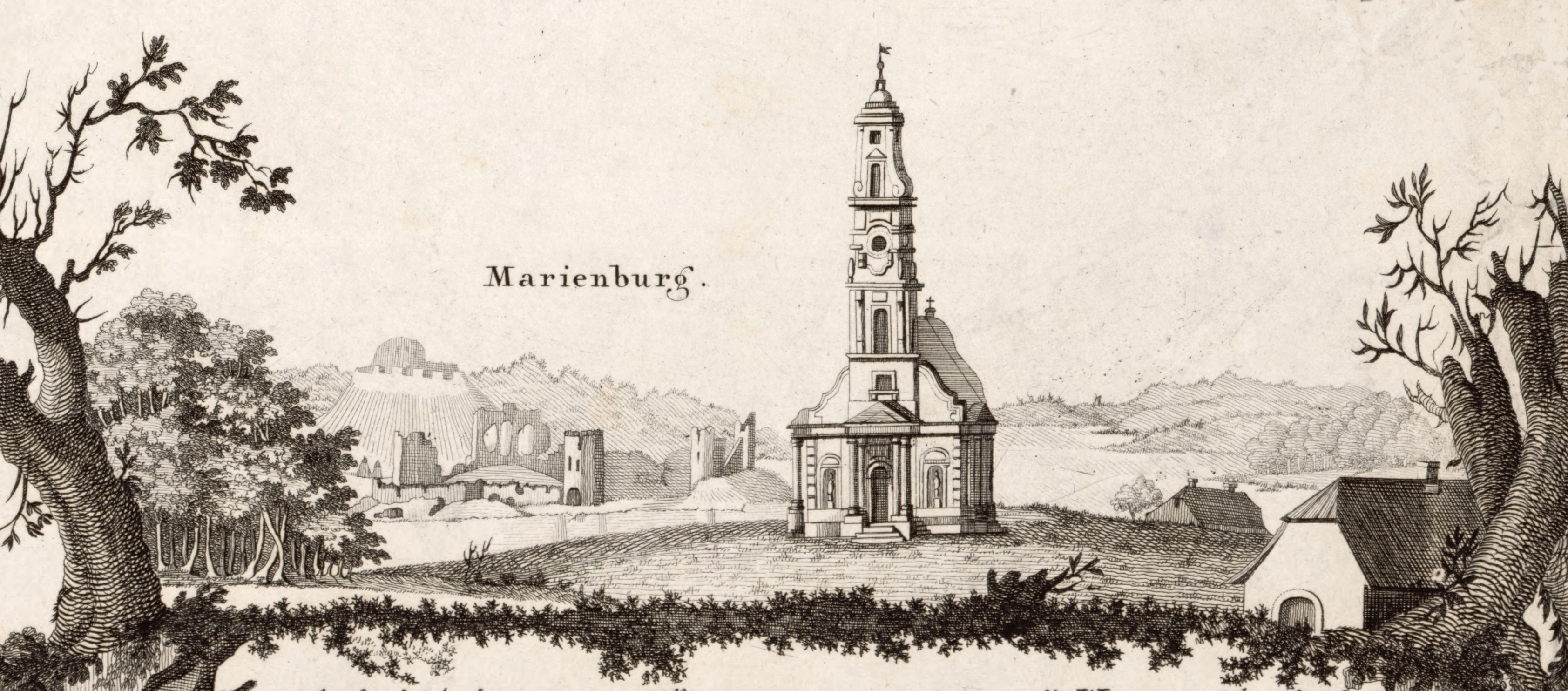 Aluliina kirik, 1791